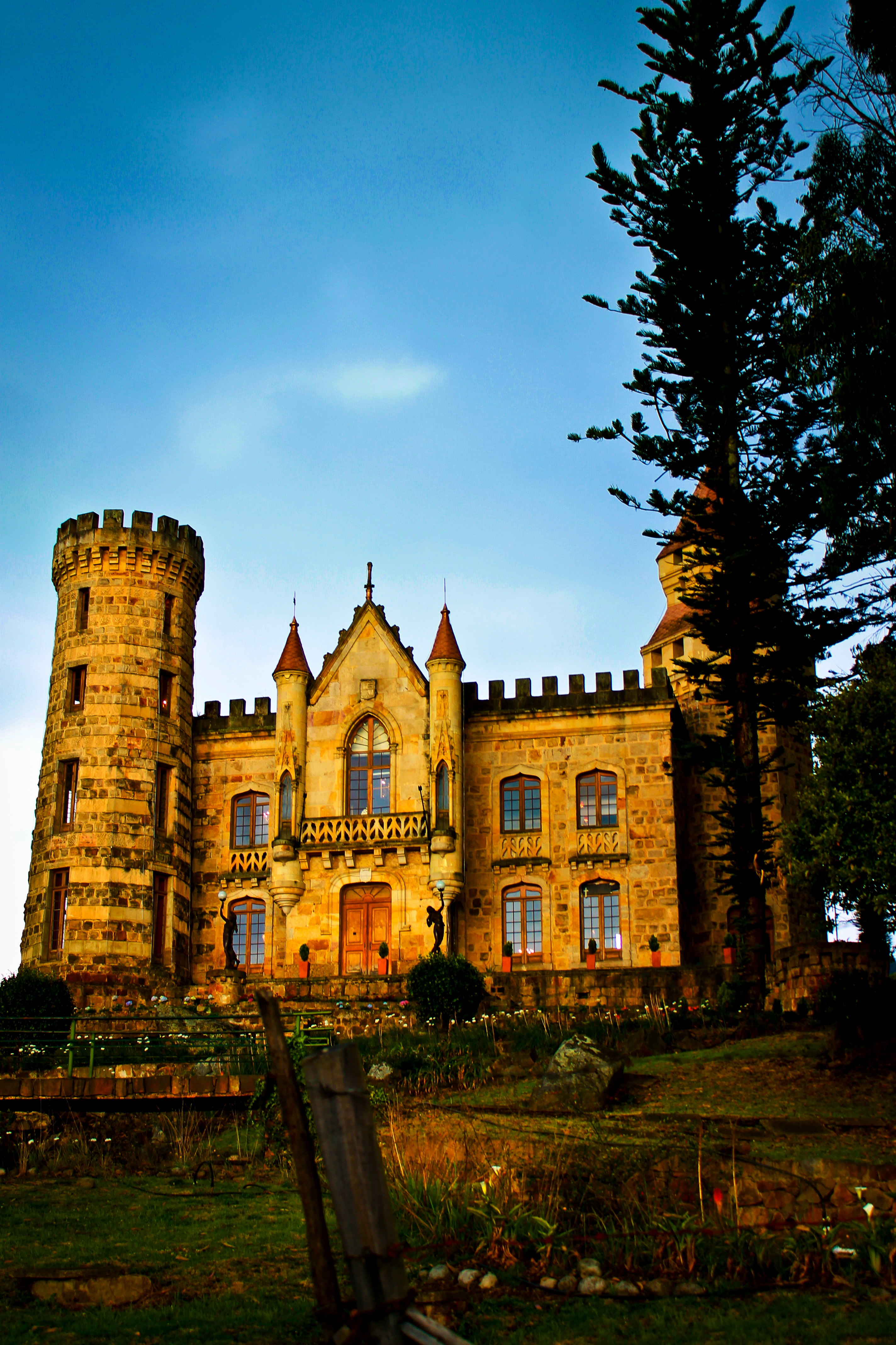 foto exteriores castillo marroquín